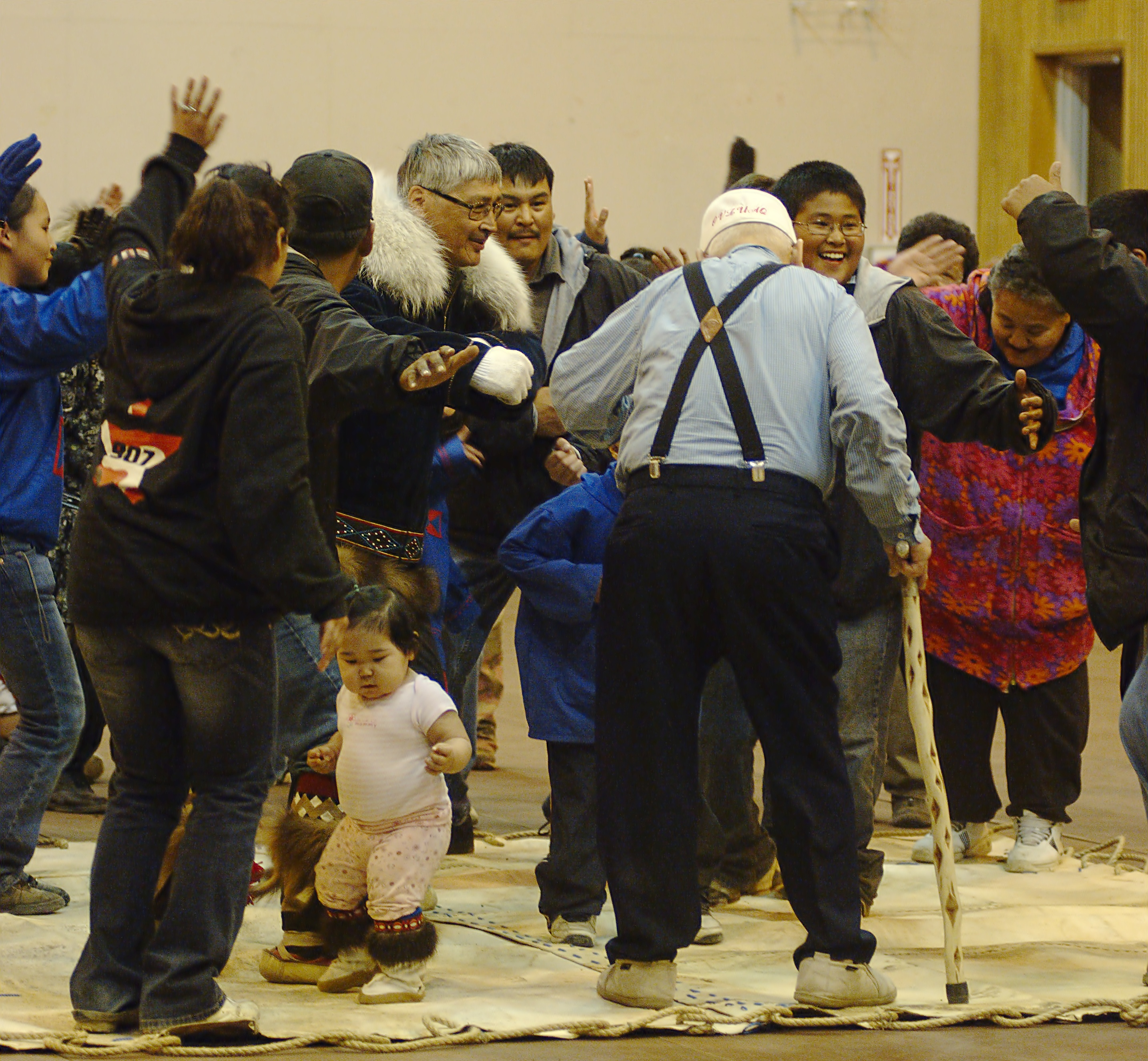 Eskimo dancing in Barrow Alaska after a Nalukataq celebration